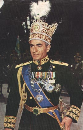 محمد رضا شاه پهلوي بعد از مراسم تاجگذاري در محوطه كاخ مرمر. مراسم تاجگذاري در كاخ گلستان تهران انجام شد و پس از آن شاه و شهبانو براي شركت در مراسم ضيافتي كه از سوي ملكه مادر در كاخ مرمر برپا شده بود با كالسكه سلطنتي به اين كاخ وارد شدند. عكس از ويژه نامه روزنامه اطلاعات براي مراسم تاجگذاري برداشته شده و جزييات مراسم در آن شرح داده شده است.